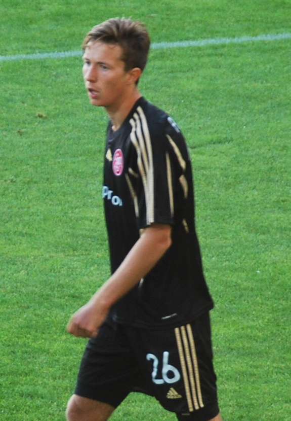 Fodboldspilleren Jakob Ahlmann fra AaB. Her i pokalkampen imellem Viborg FF og AaB på Viborg Stadion.